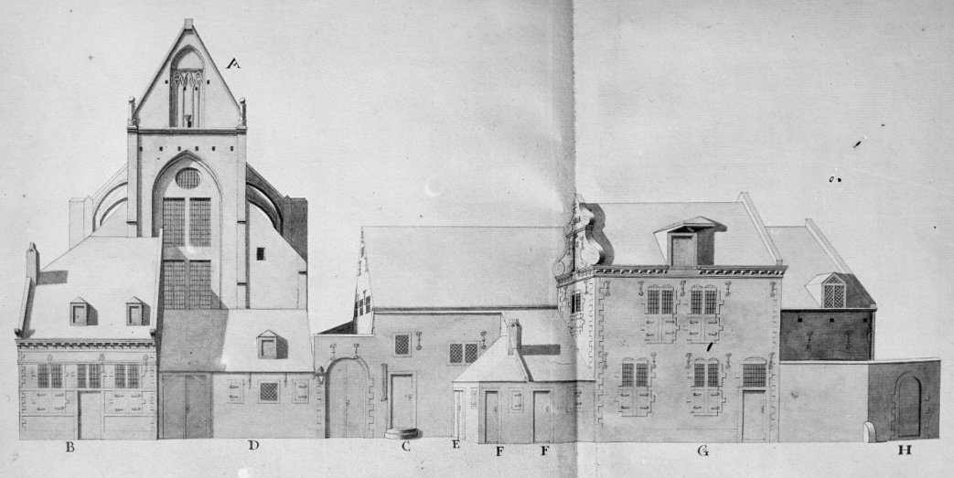 Voormalig Franciscanerklooster: klooster en Franciskanerkerk naar tekening in het album der kanoniers in het Archief